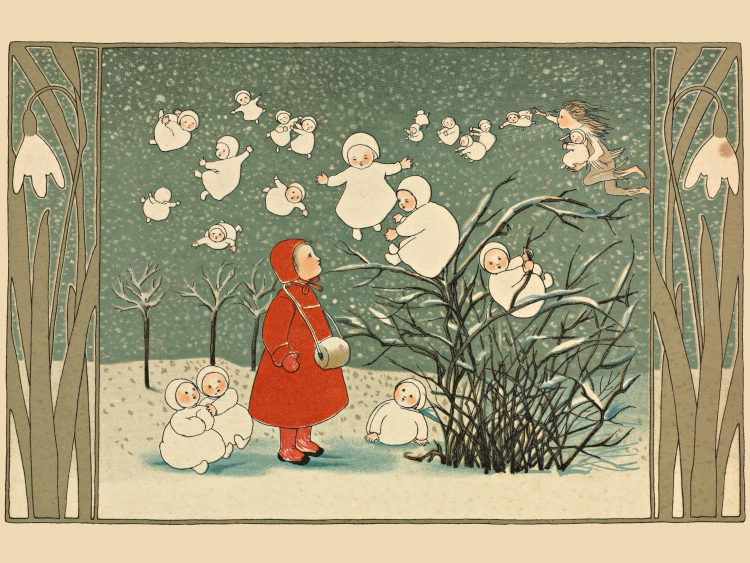 Marietje in Sneeuwland. Uit: Sibylle von Olfers, Marietje in Sneeuwland : een nieuw prentenboek, 1909. Signatuur: KW Ki 8175.